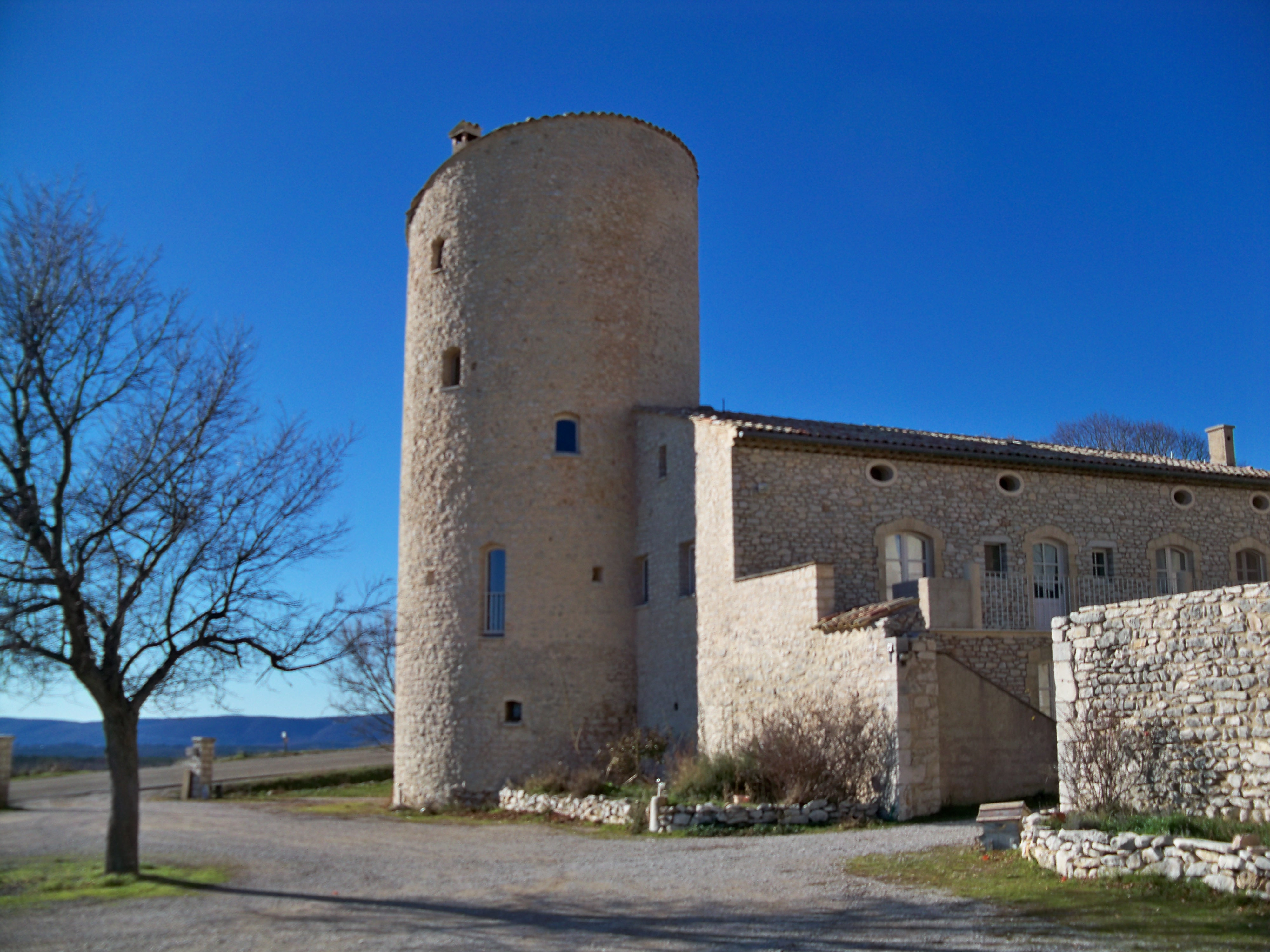 Chateau de la Gabelle (Ferrassières)